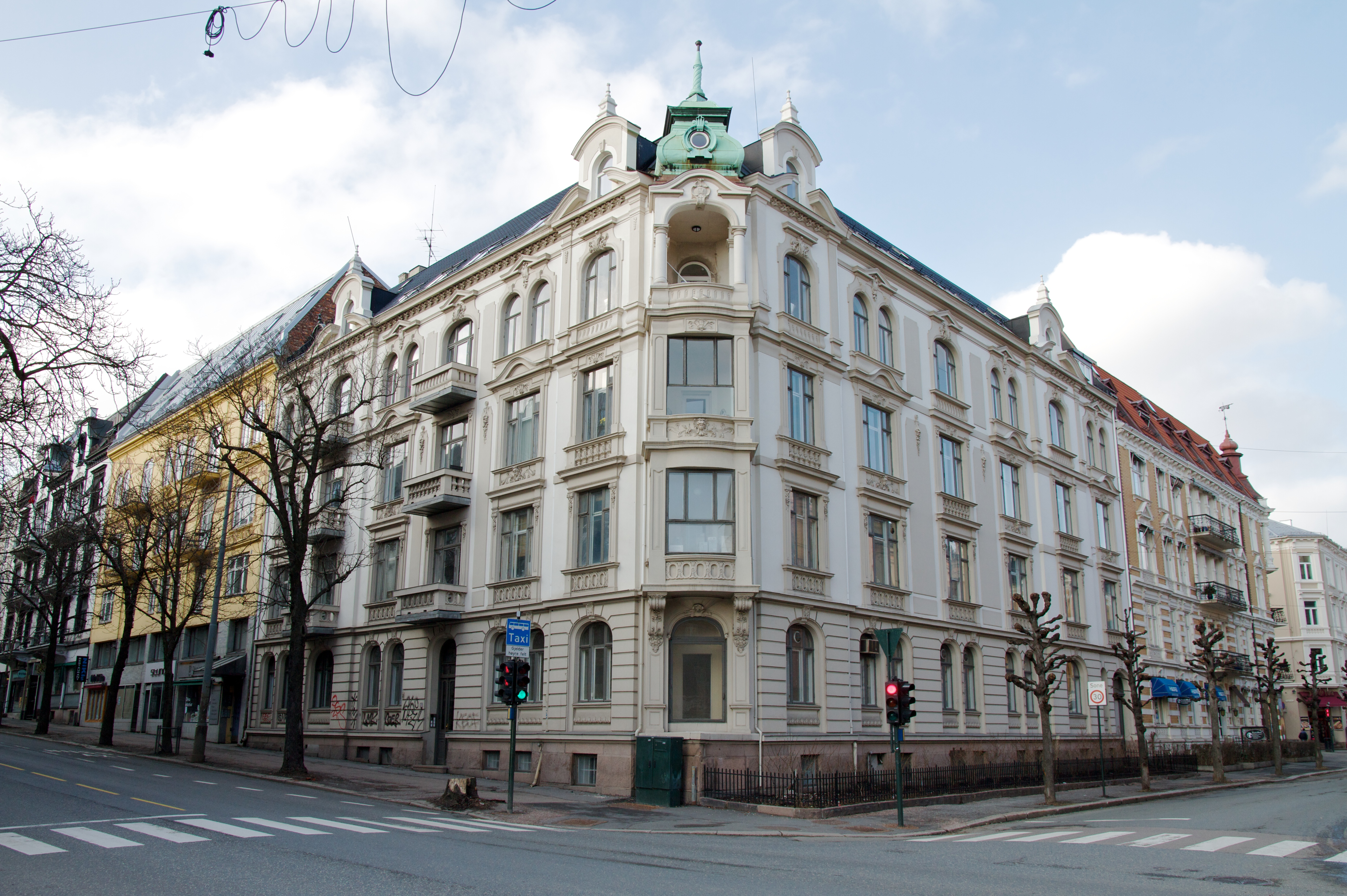 Bygdøy allé 17. Frogner i Oslo.